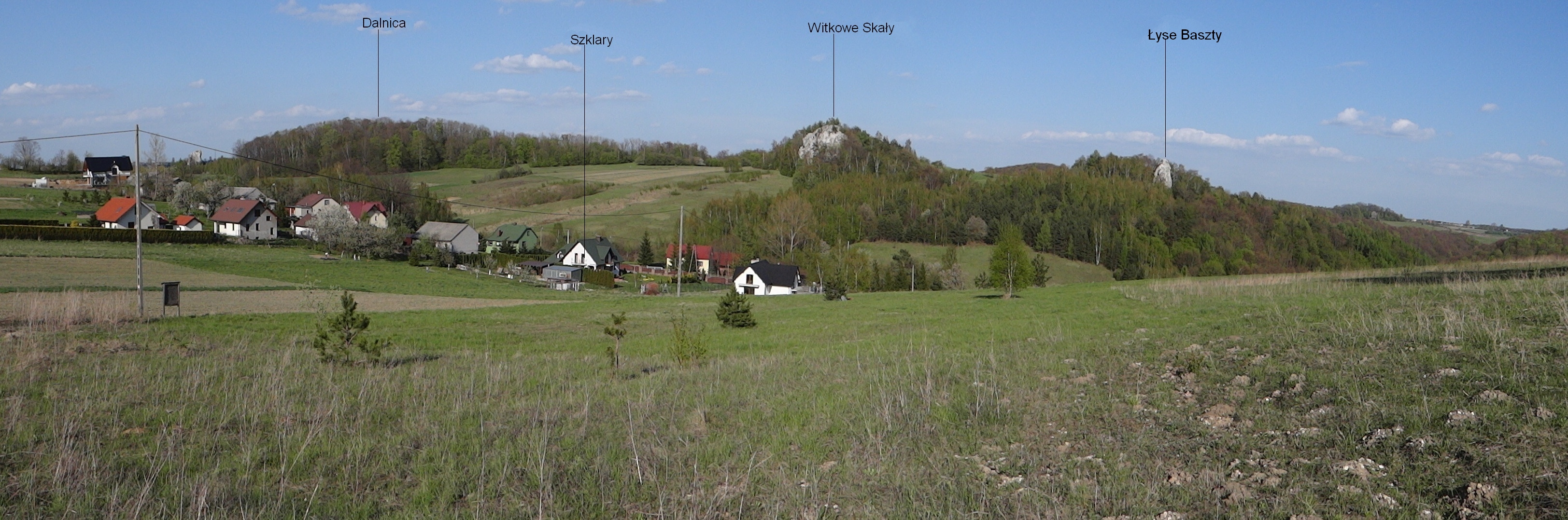 Dolina Szklarki